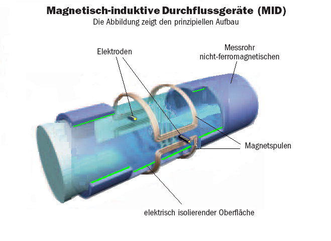 Prinzipaufbau eines MIDs